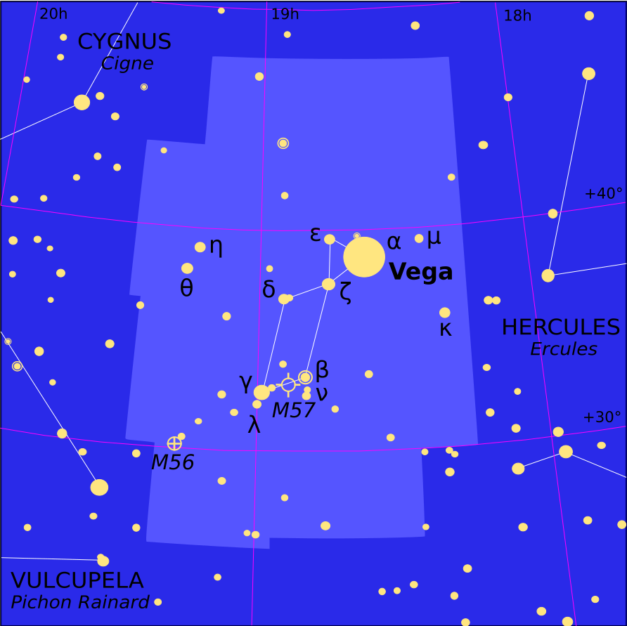 Representacion de la constellacion de la Lira.